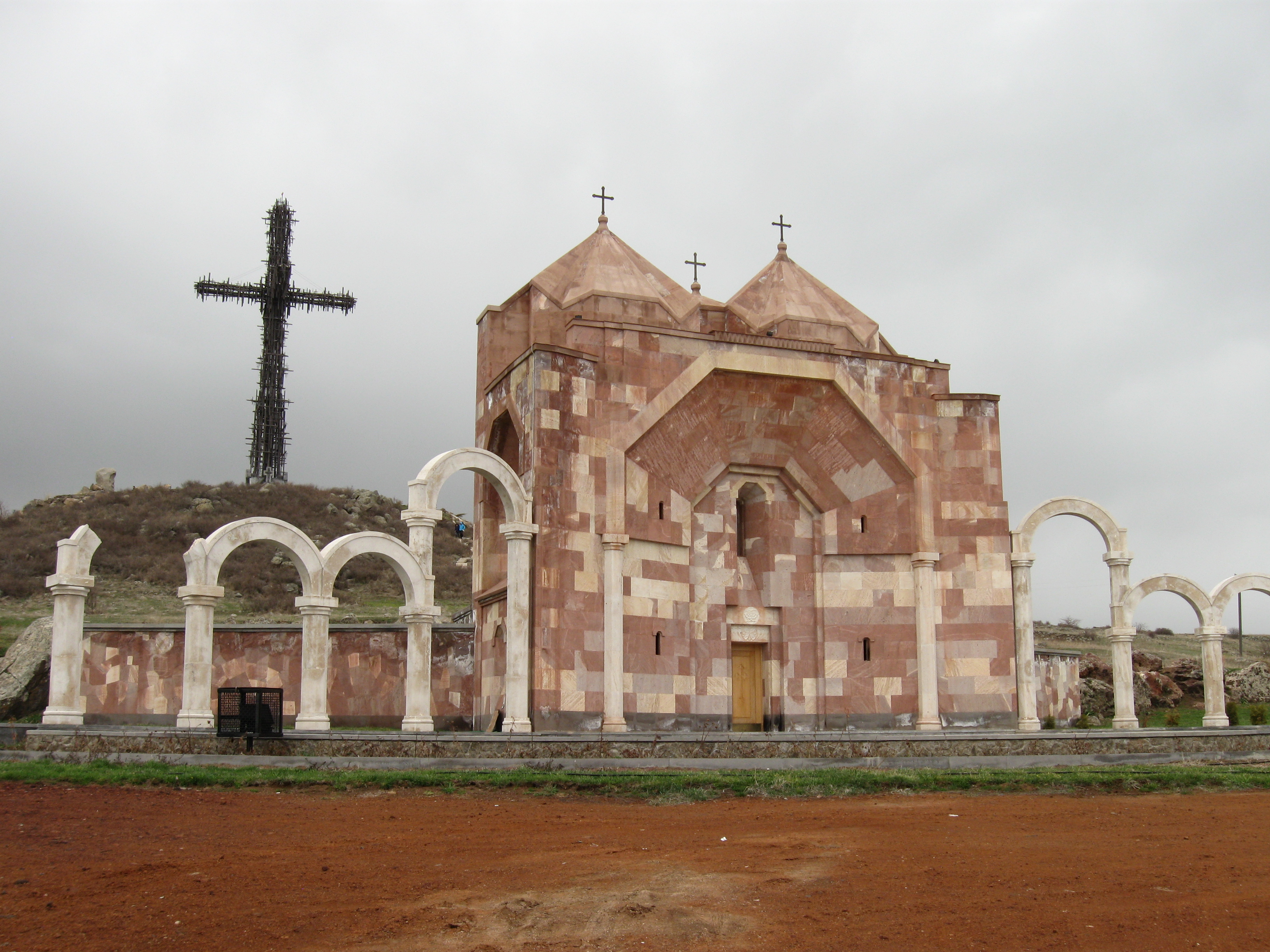 Ապարանի խաչը և խորանը